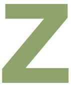 Imagen de la letra Z